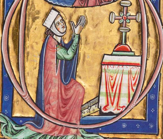 Blanka Kastilská při modlitbě